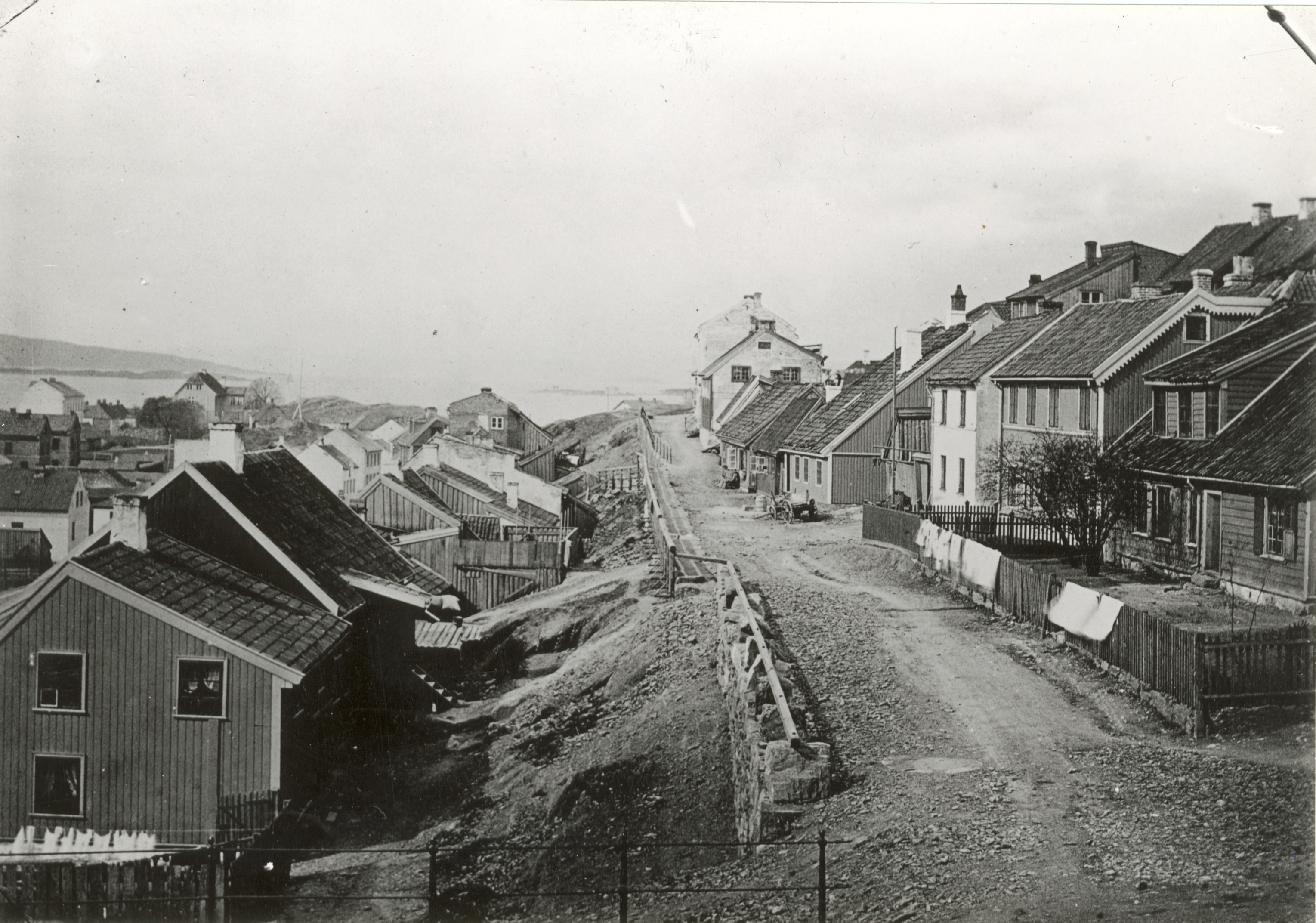 Ruseløkkbakken, Røverstatene i Oslo, Oslo Ruseløkkbakken «Tunis og Algier». Gammel trehusbebyggelse i Vika. Revet This image on crowdsourcing geotagging platform Fotodugnad